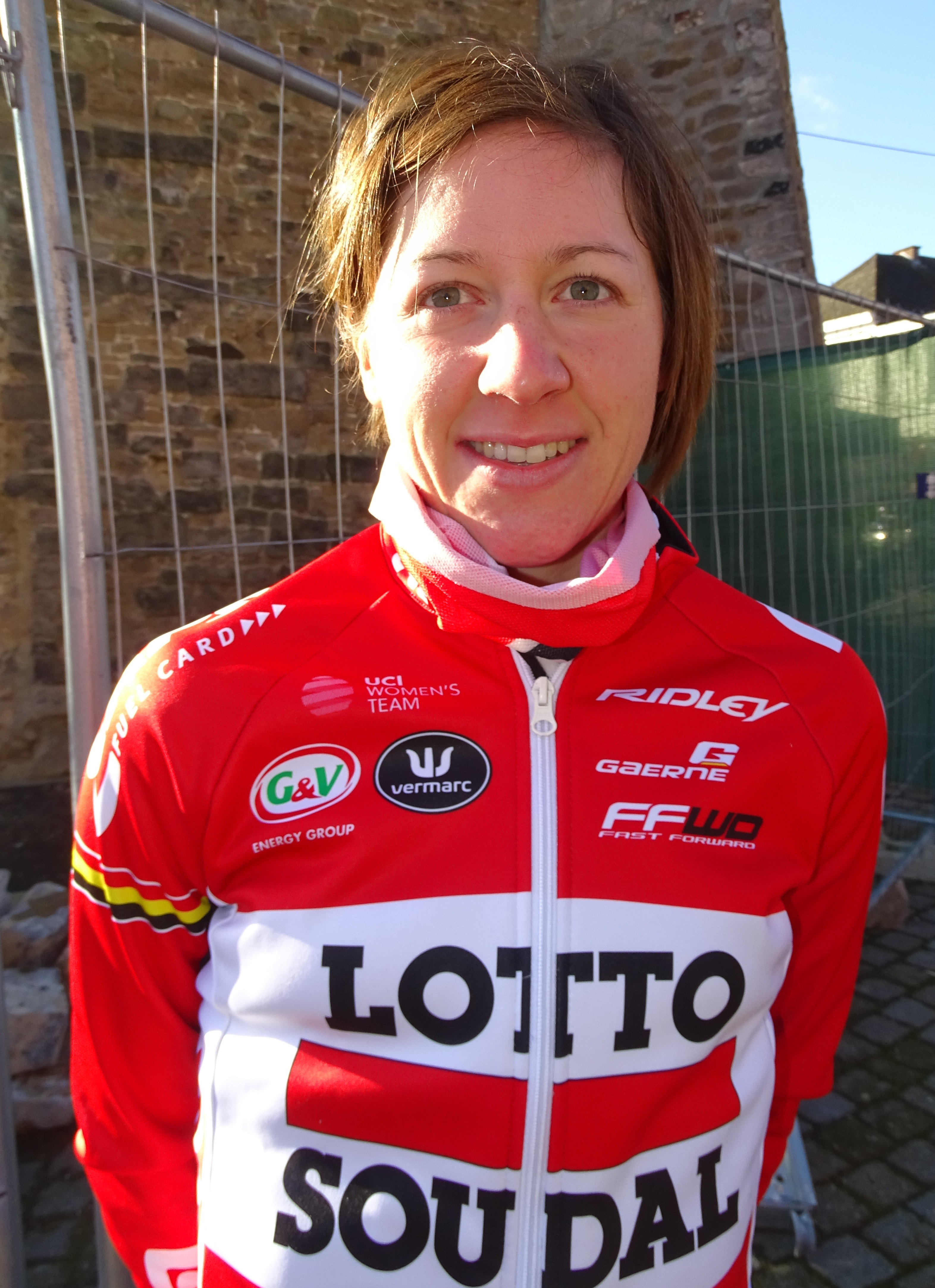 Reportage réalisé le mercredi 2 mars à l'occasion du départ du Samyn des Dames 2016 et du Samyn 2016 à Quaregnon, Belgique.